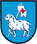 Herb Czekanowa (gmina Zbrosławice, powiat tarnogórski, województwo śląskie, Polska)